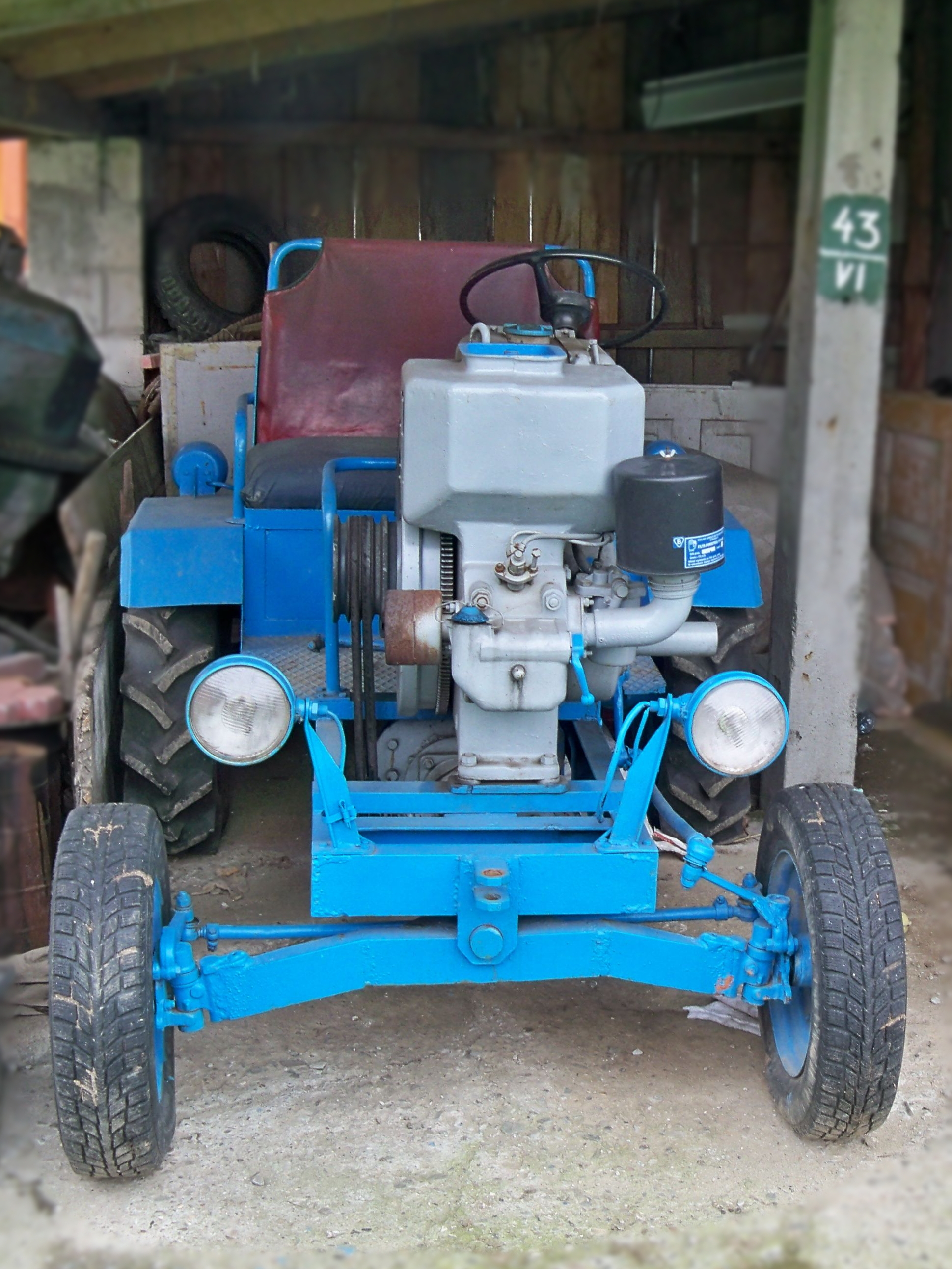 Traktor domowej produkcji, tzw. "Esiok 15" o napędzie silnika S-15 (Andoria) z elementami samochodu Warszawa używany w Trzebosi